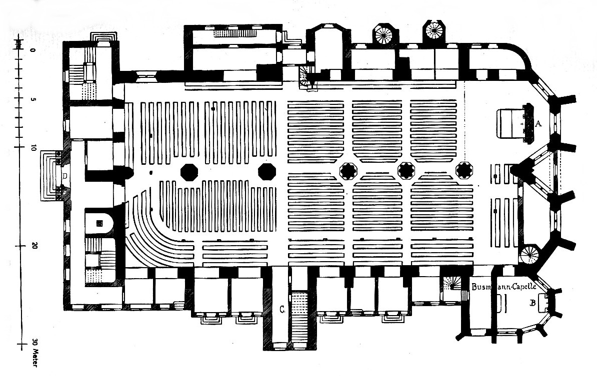 Grundriss der Dresdner Sophienkirche vor dem Umbau 1864